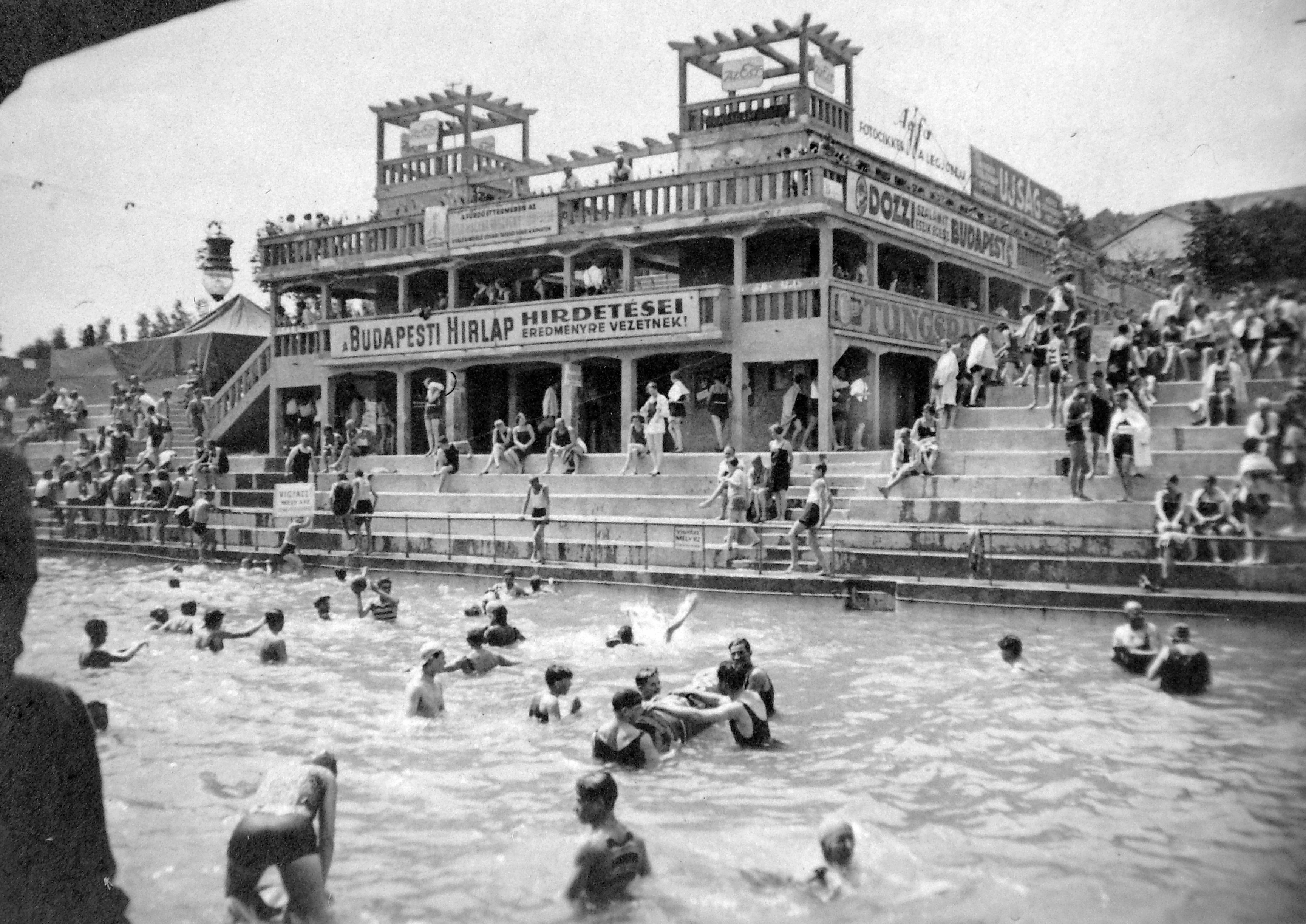 Csillaghegy, Árpád strandfürdő. Location: Hungary, Budapest III. Tags: Budapest, swimming pool Title: Csillaghegy, Árpád strandfürdő.